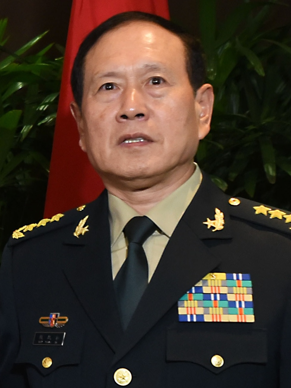 中华人民共和国国务委员兼国防部部长魏凤和